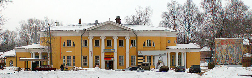 Вичуга: Коноваловские ясли(1912), арх. В. Адамович, И. Жолтовский